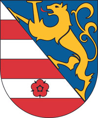 Wappen der Stadtgemeinde Lienz, Osttirol